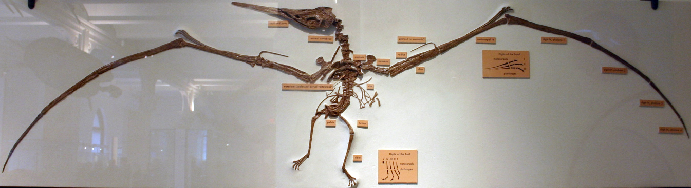 Nyctosaurus gracilis